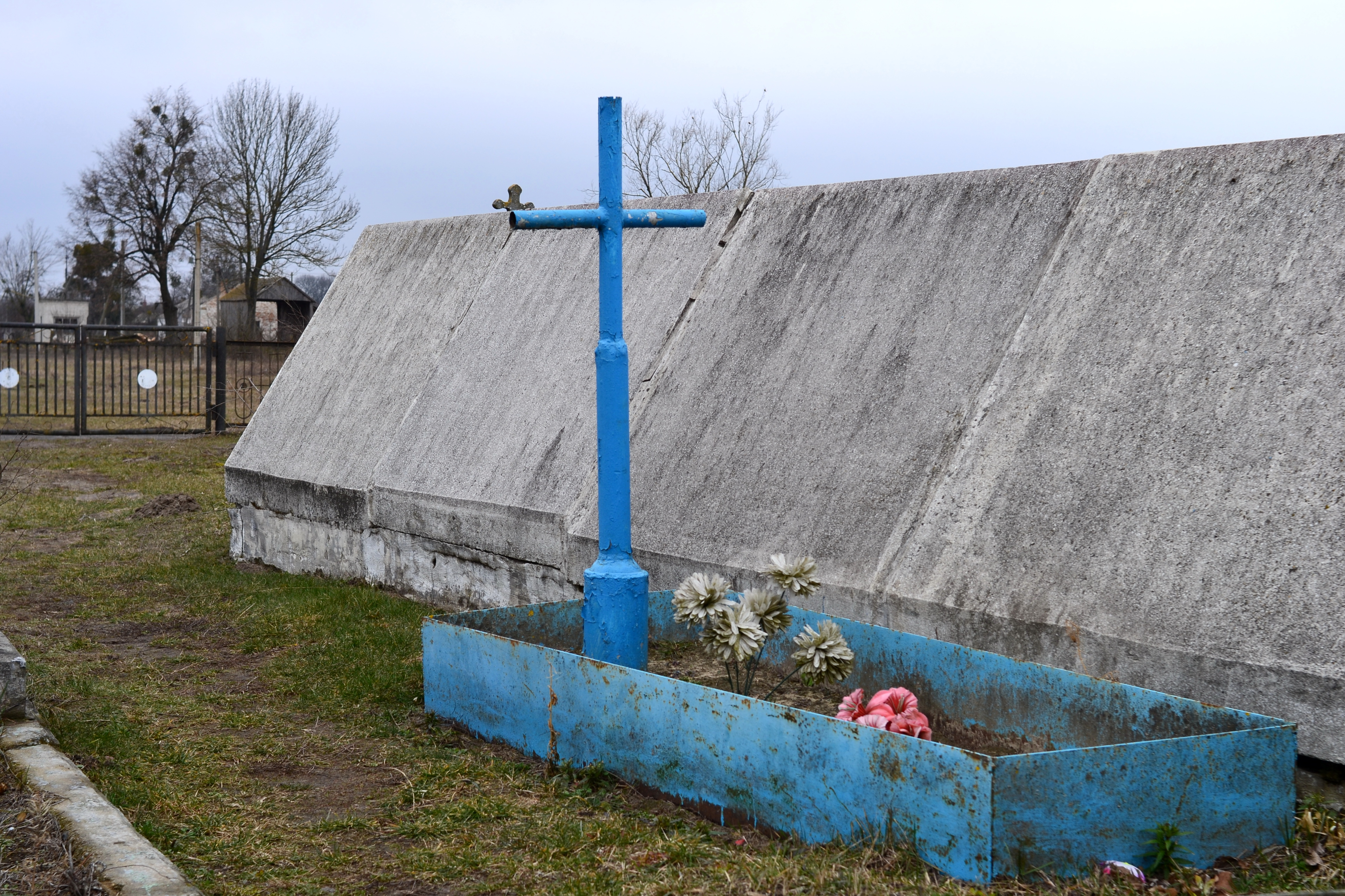 Могили братські (2) радянських воїнів (1956 рік) - друга могила - Любитів (на кладовищі) Ковельський район Волинська область Україна